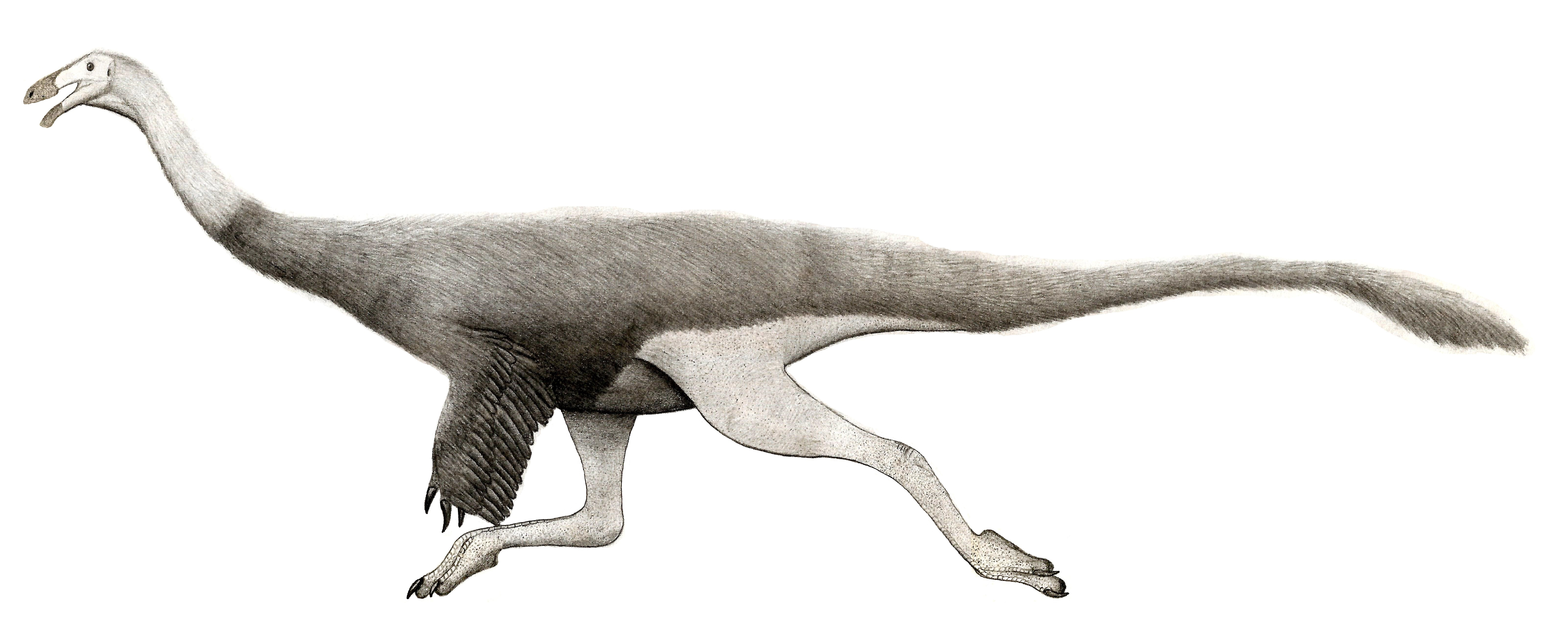 Recreación de Saltillomimus rapidus un género sin nombrar de Coahuila, México.